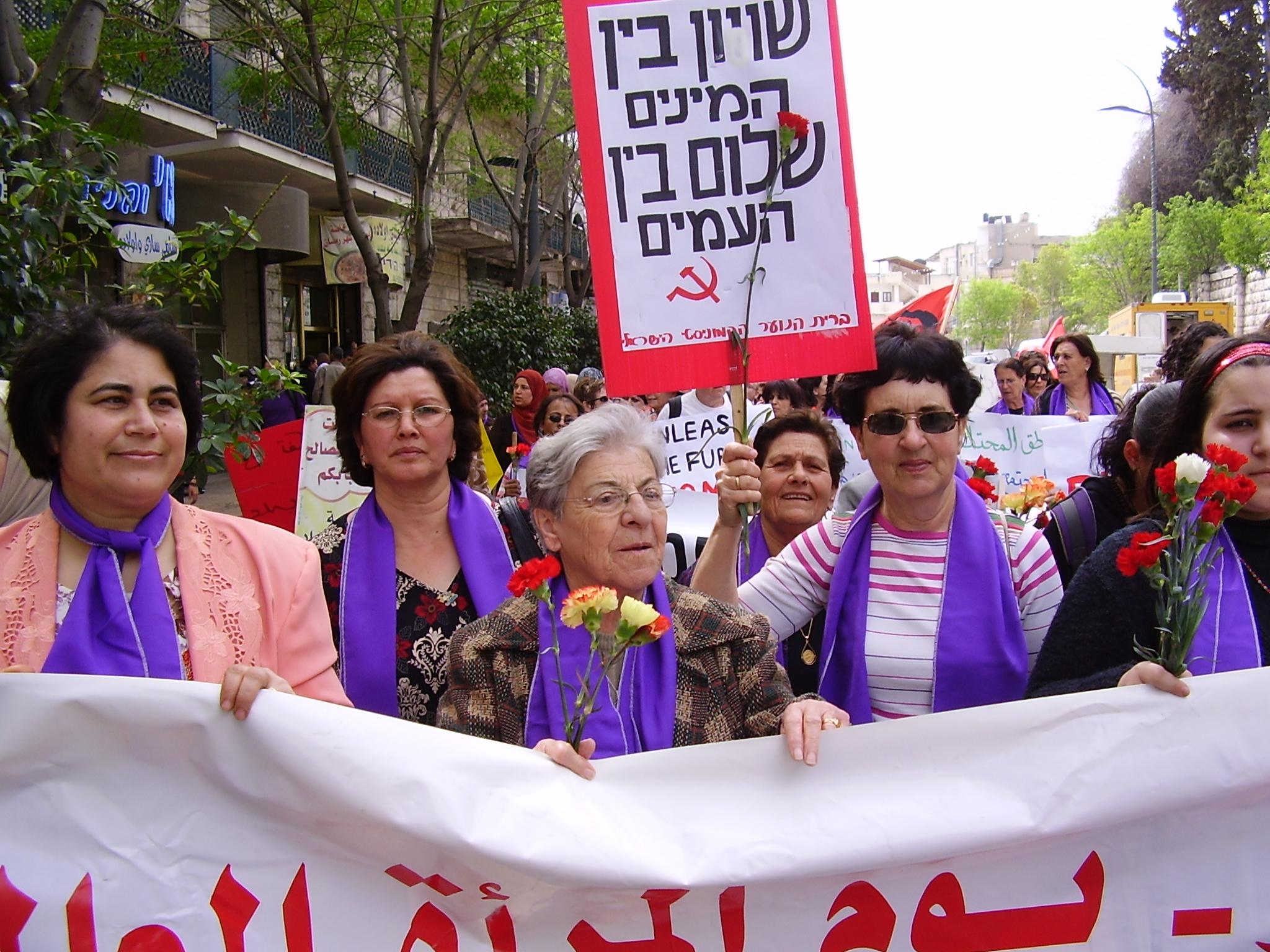 סמירה חורי בתהלוכת יום האישה בנצרת מימין לשמאל: תמר גוז'נסקי, סמירה חורי (בידה זר פרחים), סלווה סרוג'י, פתחיה סגייר.